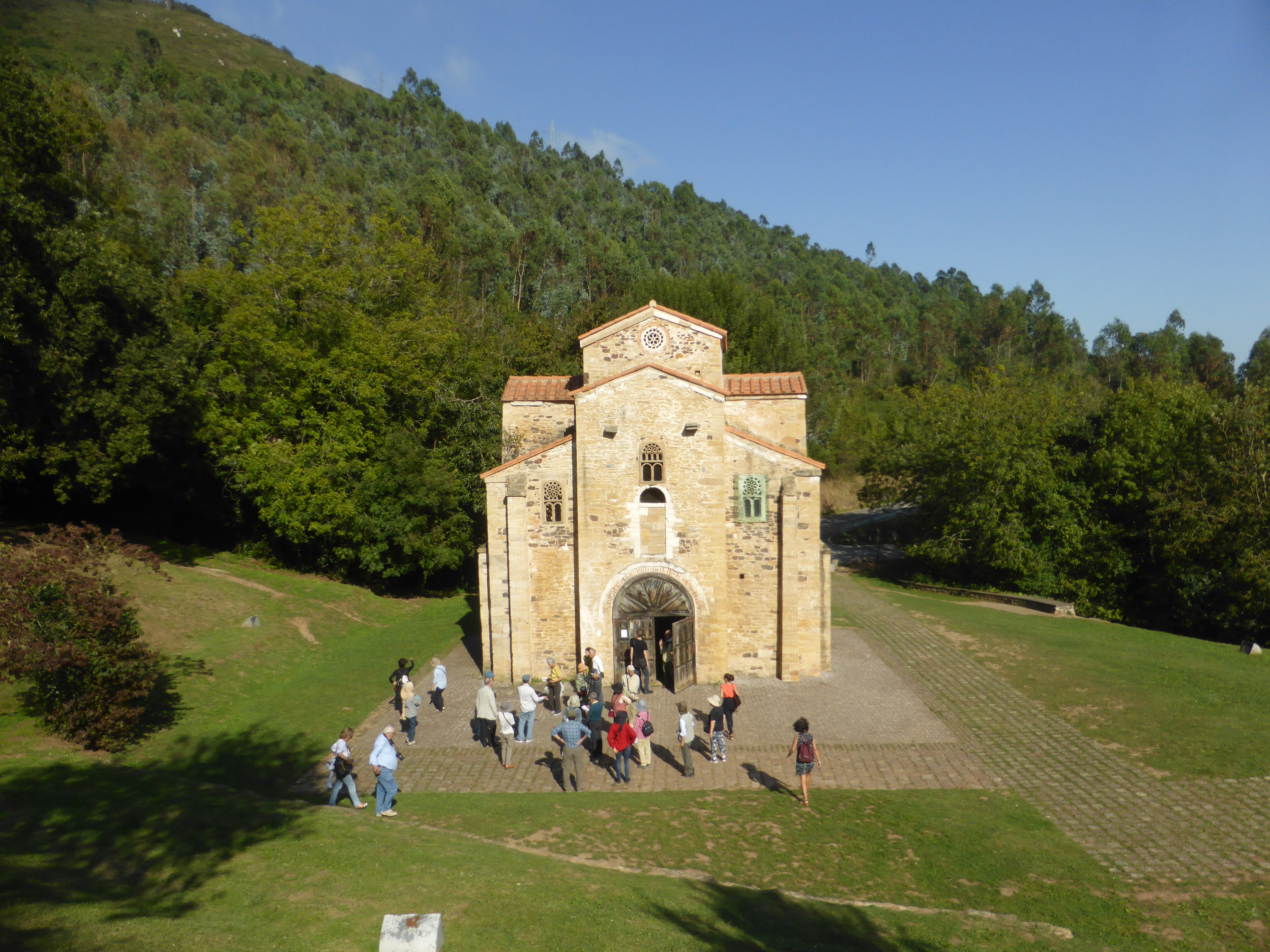 Iglesia del siglo IX. En el monte Naranco, en los alrededores de Oviedo. Se conserva una tercera parte de su longitud. Principado de Asturias.